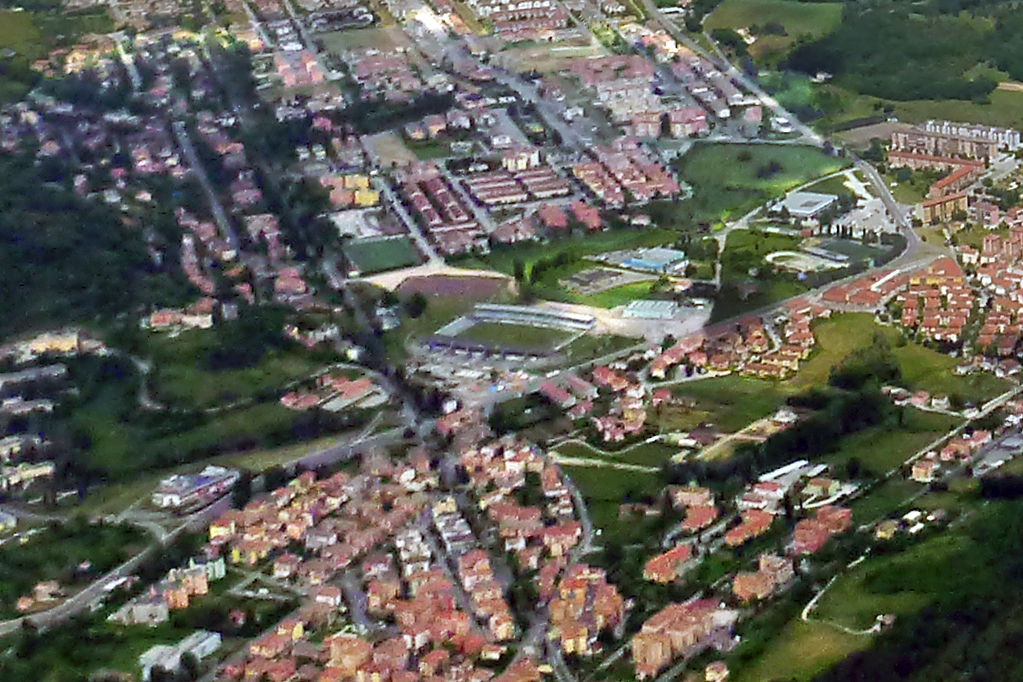 Lo stadio Centro d'Italia-Manlio Scopigno di Rieti visto dall'alto, tra i quartieri Piazza Tevere (in basso), Villa Reatina (a destra) e Campoloniano (in alto). Sono visibili anche i circostanti impianti sportivi del polo sportivo di Campoloniano.